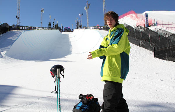 Torin Yater-Wallace